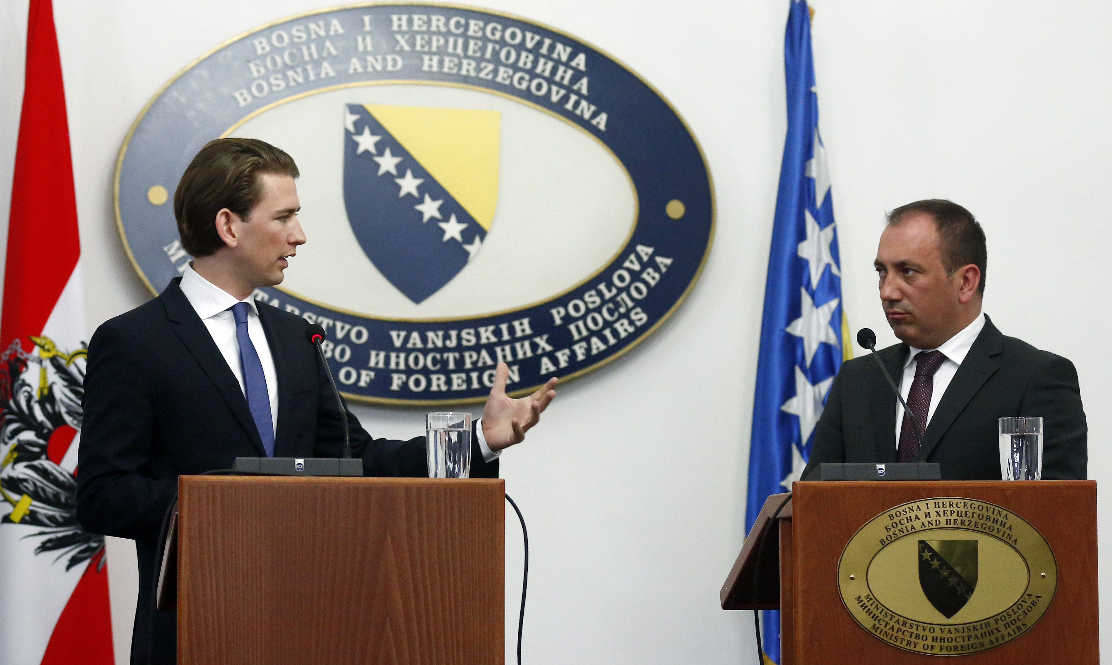 Arbeitsbesuch Bosnien. Bundesminister Sebastian Kurz trifft den bosnischen Außenminister Igor Crnadak. Pressekonferenz, Sarajevo, 18.06.2015, Foto: Dragan Tatic